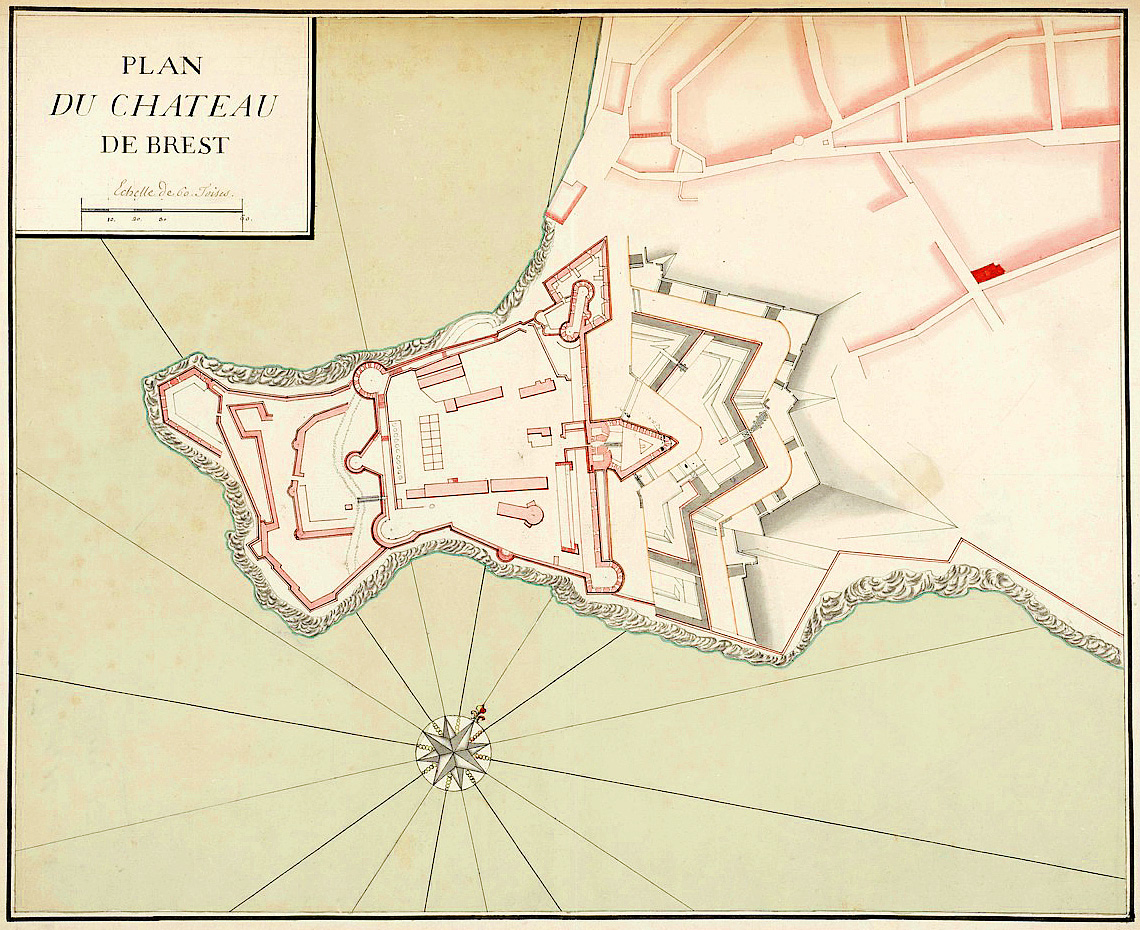 Château de Brest 1723 Extraits de la collection Nivart, conservée dans les fonds de la Marine